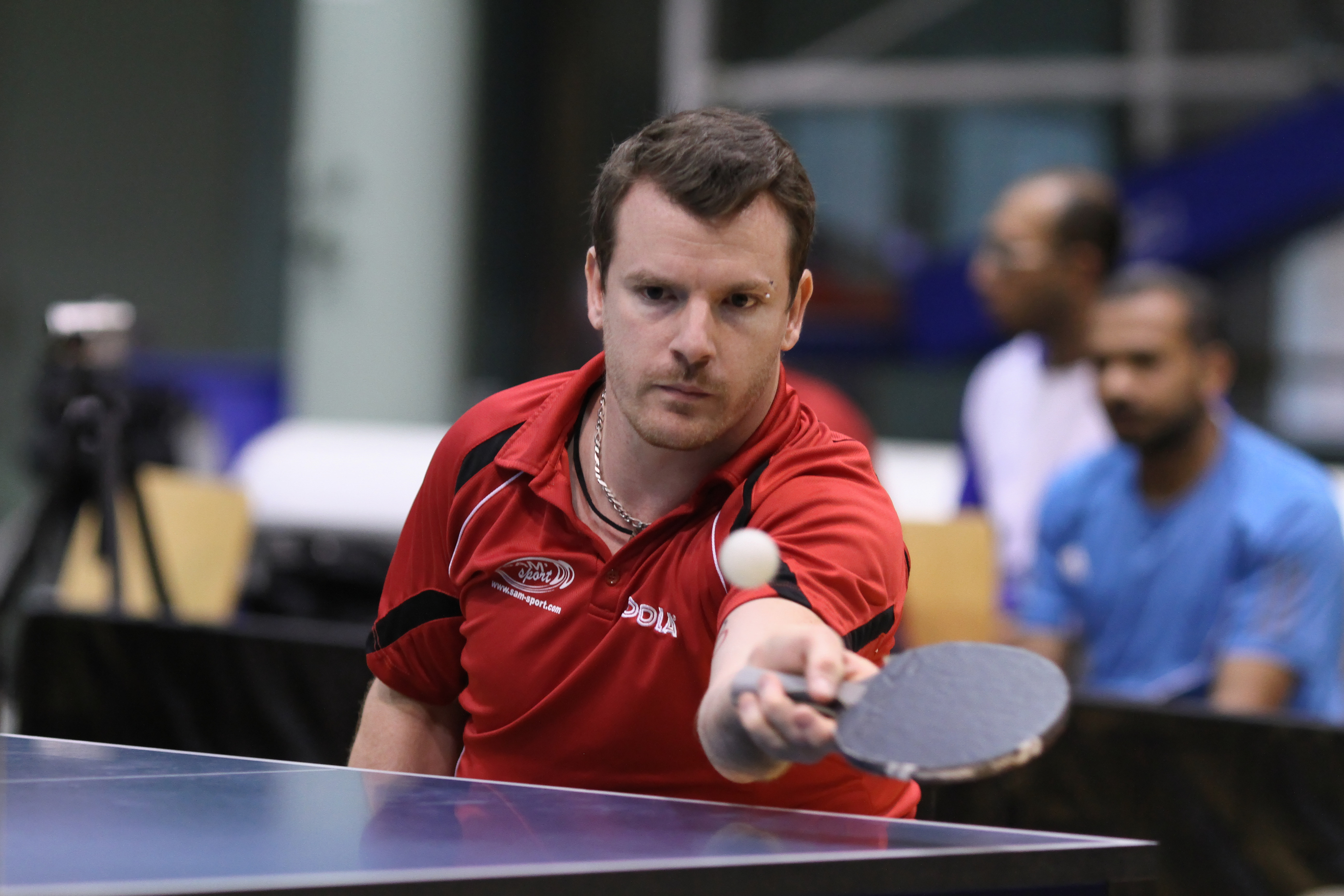 MERRIEN Florian (FRA) IMG_6678_DxO